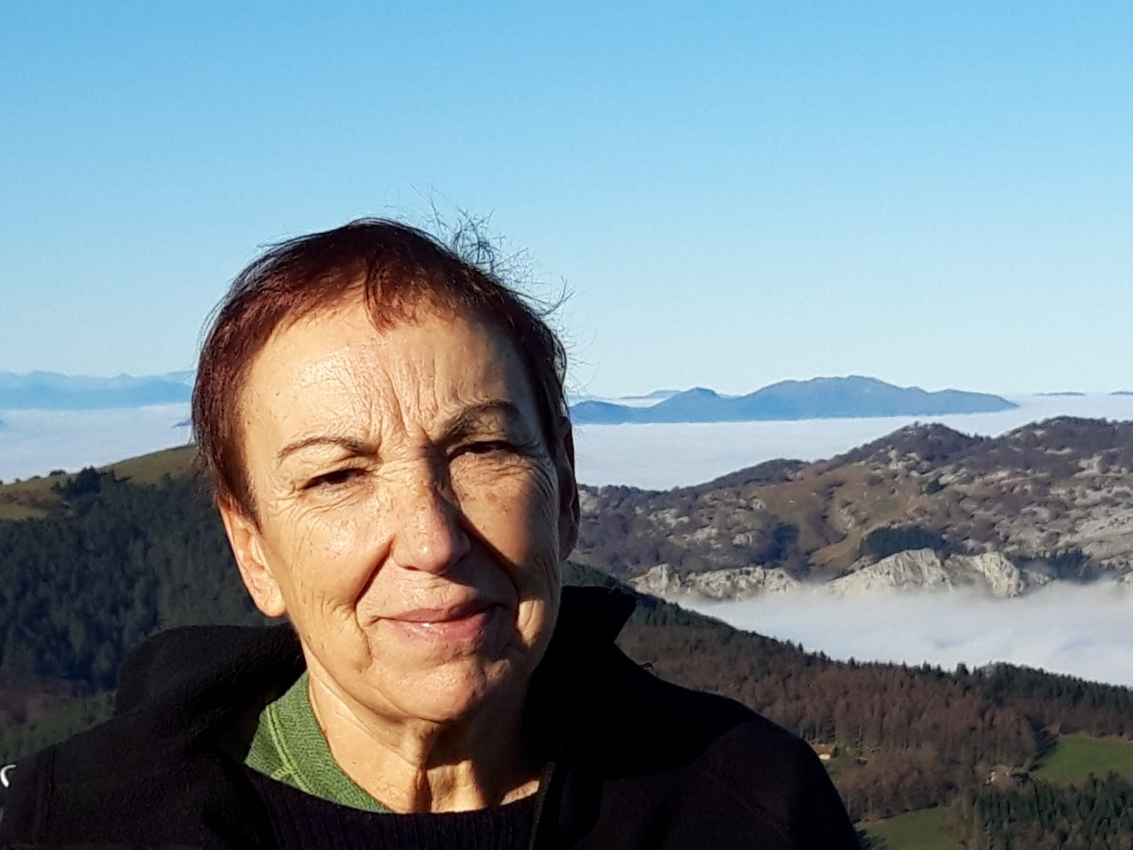 Mariam Bilbatua Doctora en Ciencias de la Educación HUHEZI